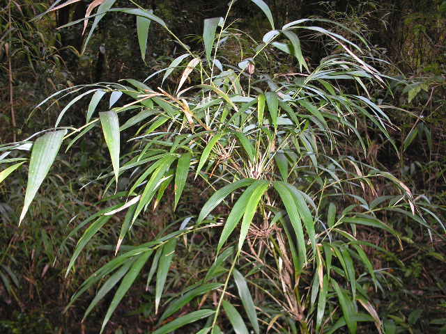 Ramas de Chusquea quila en Cole-cole, costa occidental de la Isla Grande de Chiloé